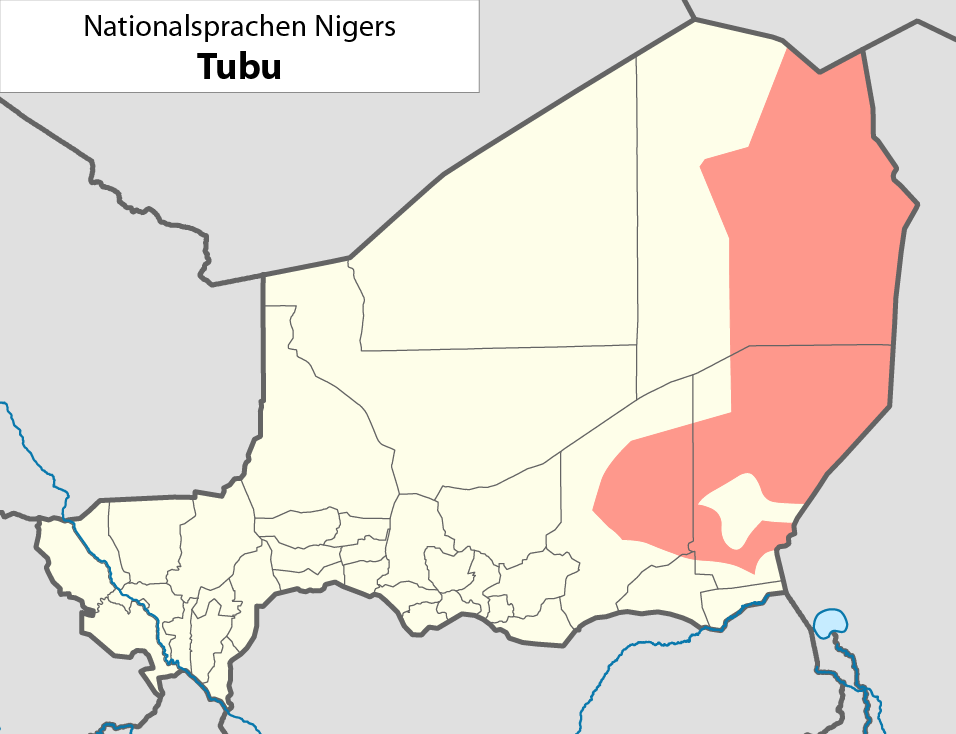 Nationalsprachen des NigerDie dargestellte Nationalsprache kann dem Dateinamen entnommen werden.